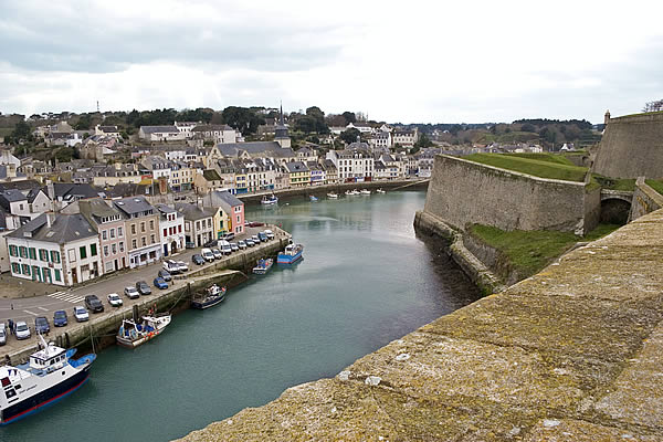 Le Palais - Belle île Photo issue de ma banque d'images : Pep.per 20 octobre 2006 à 22:13 (CEST)